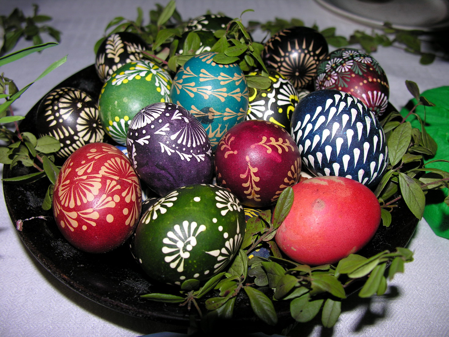 Margučiai